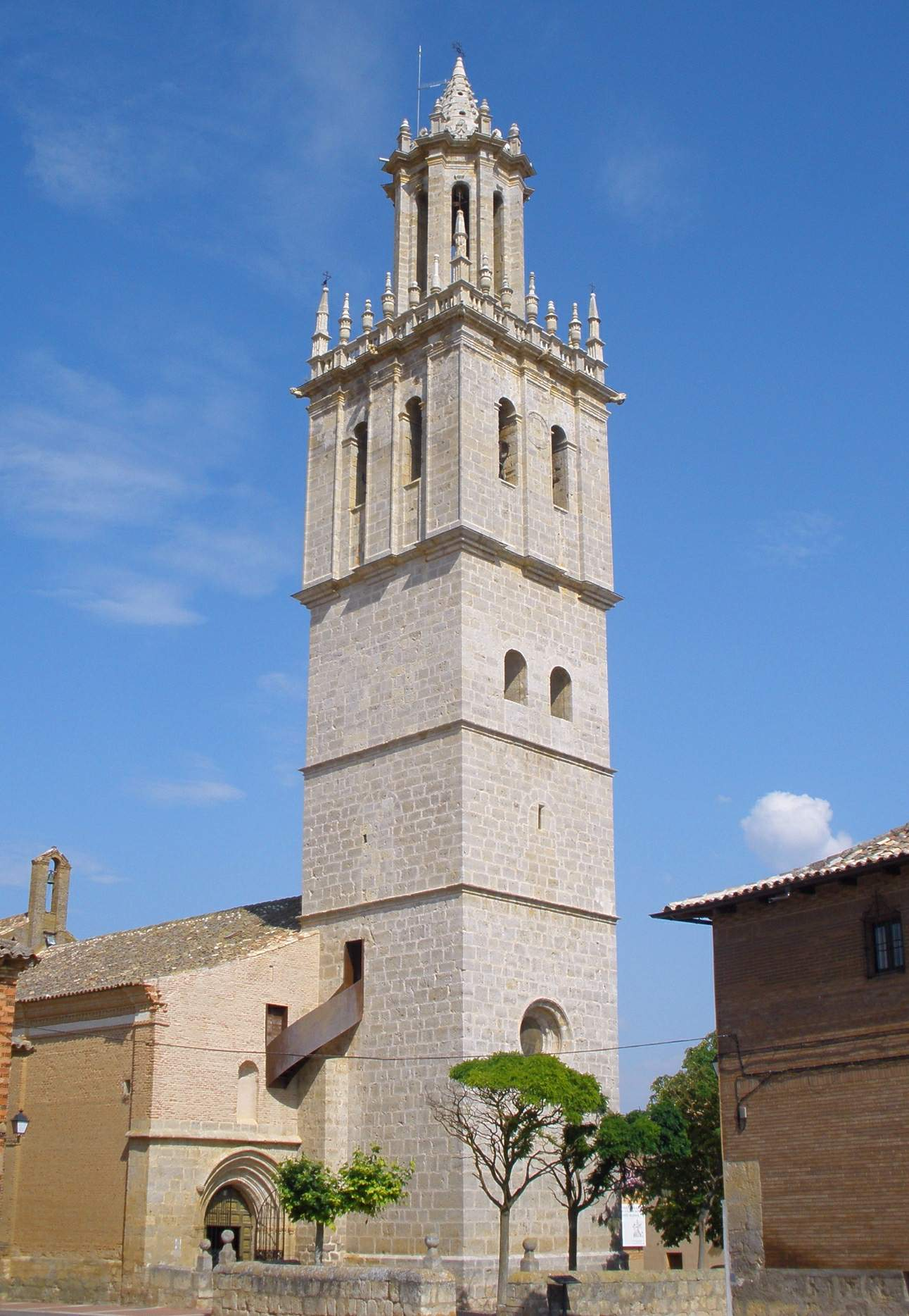 Fuentes de Nava (Palencia) - Iglesia de San Pedro